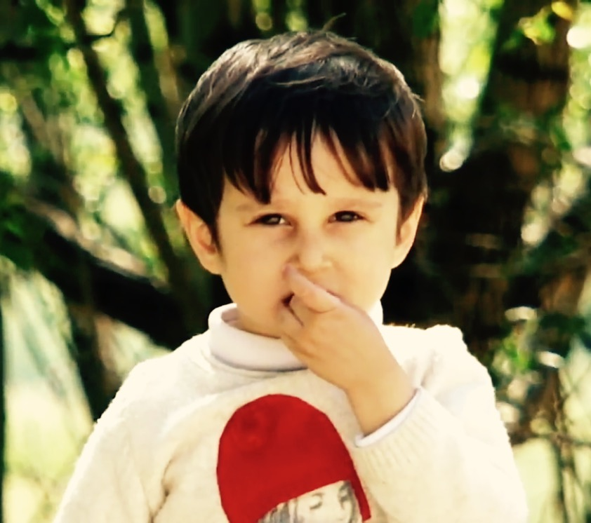 Culfalı balaca qız